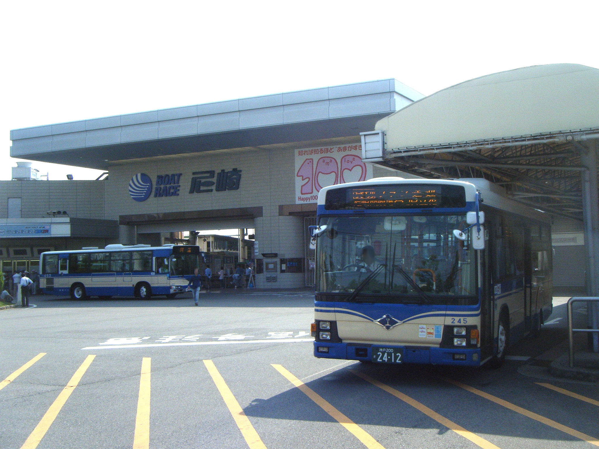 尼崎競艇場正面ロータリーに停車する阪神バス 行先表示は [貸切] ファン送迎 尼崎競艇場⇔JR立花